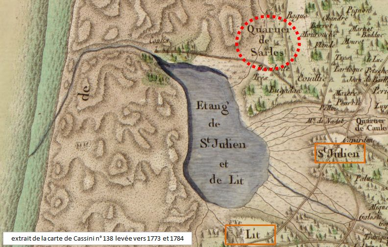 La dune de Broque fixée par les frères Desbiey vers 1752 menaçait ce quartier de Saint-Julien